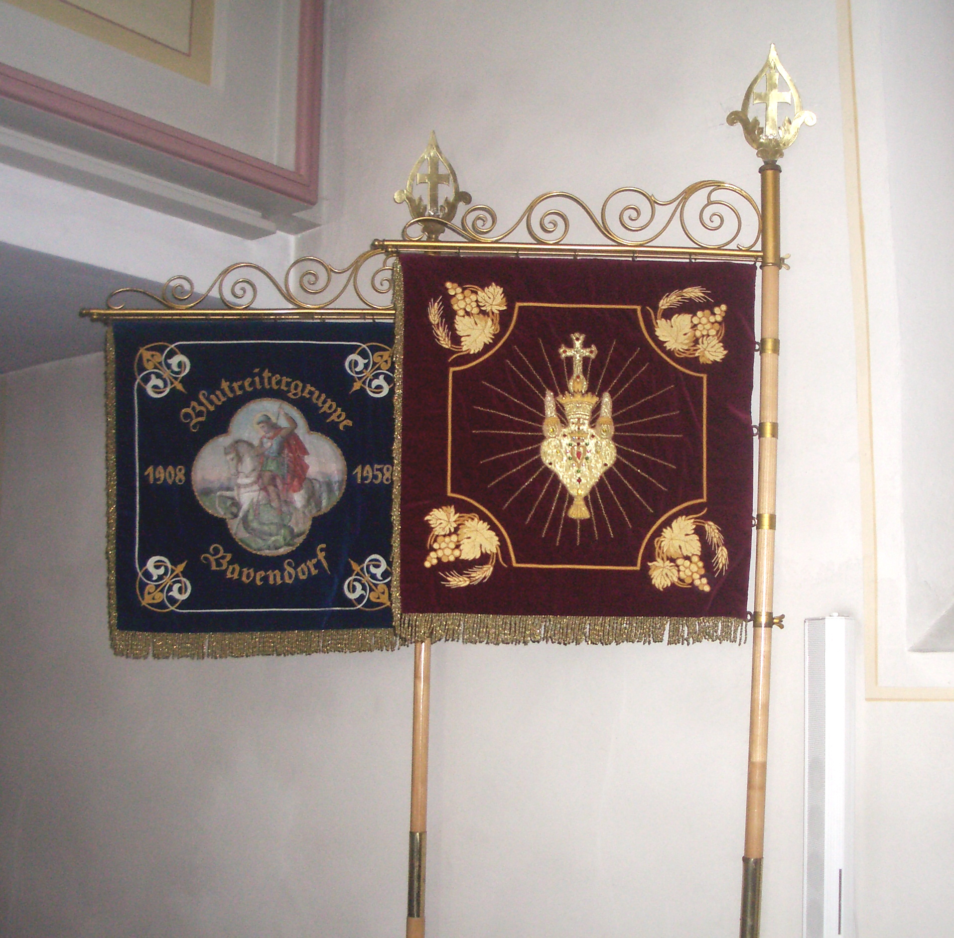 Ravensburg, Ortschaft Taldorf: Pfarrkirche St. Columban, Bavendorf - Fahnen der Blutreitergemeinschaft Bavendorf (der Teilnehmer der jährlichen Reiterprozession Hl.-Blut-Ritt in Weingarten)